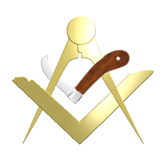 GardenersArms01.png